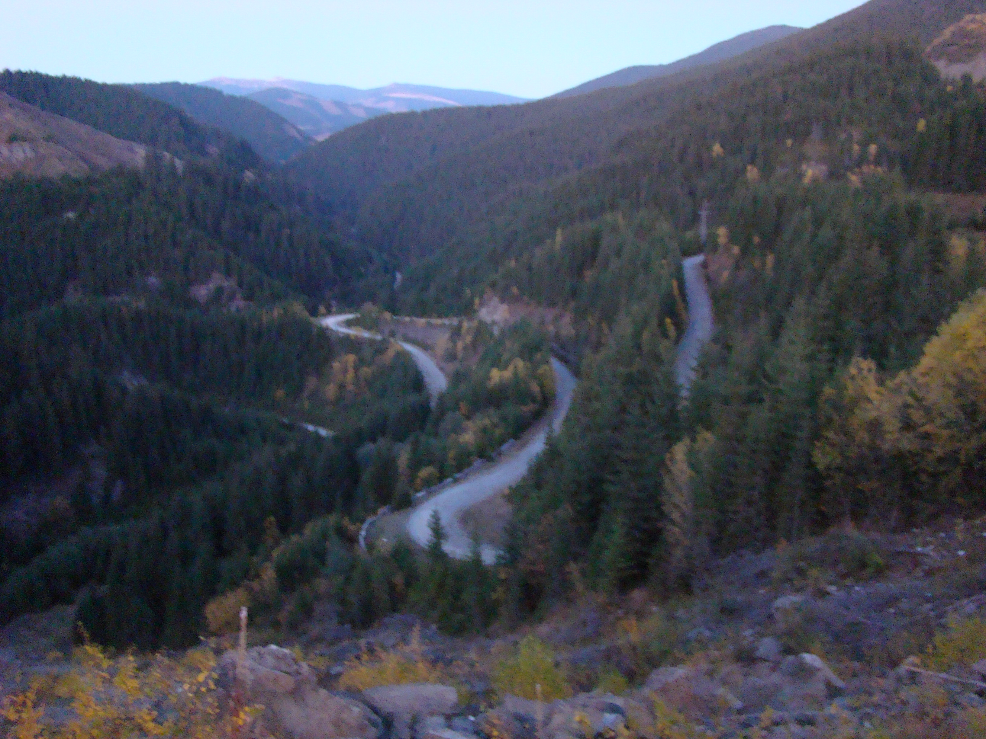 Drumul național 7A